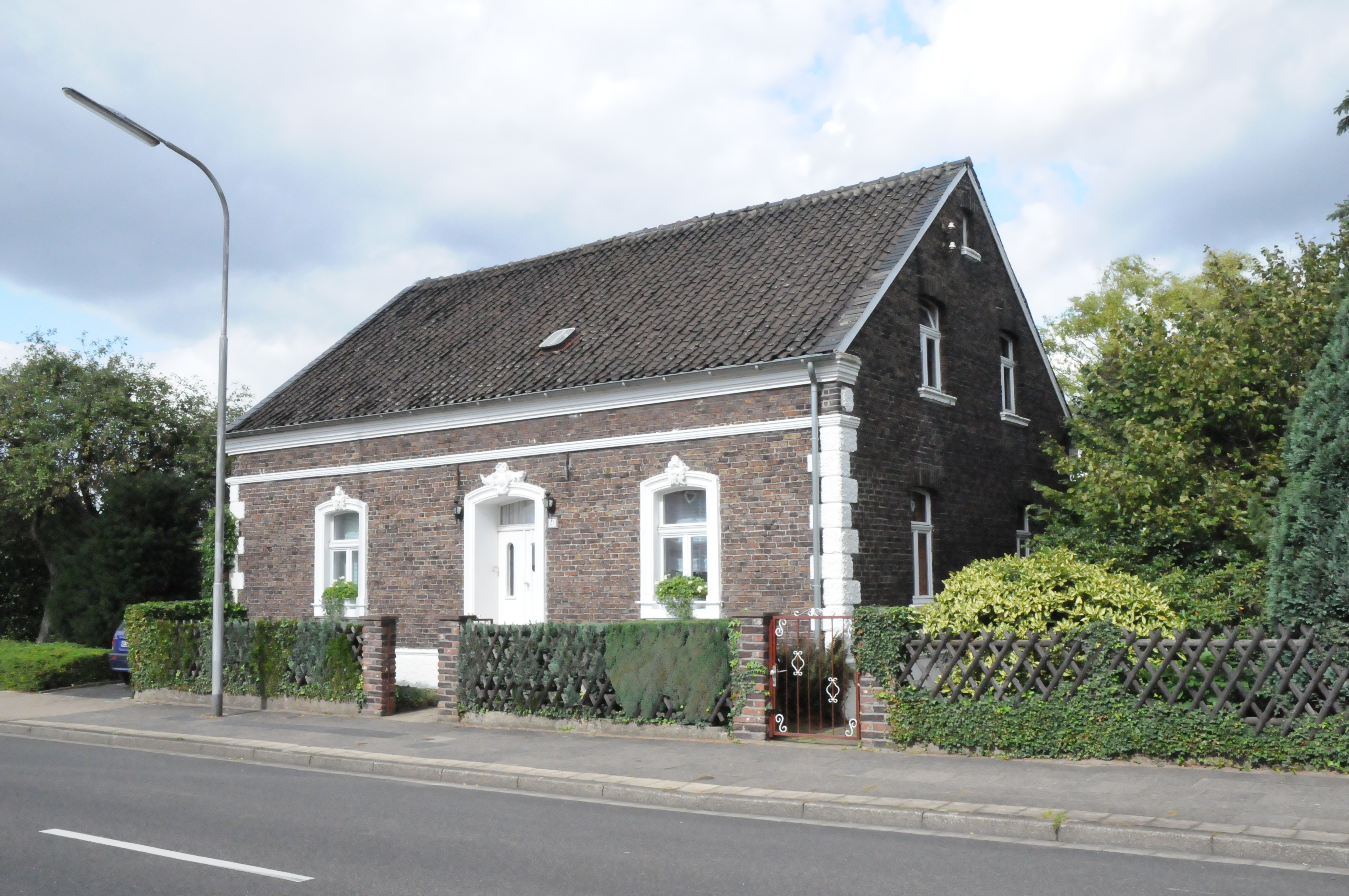 Moers, Denkmalliste Nr. 53, Bonifatiusstraße 61